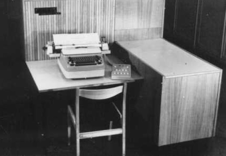 Elektronarvuti STEM, esimene Eestis projekteeritud numbriline arvuti.